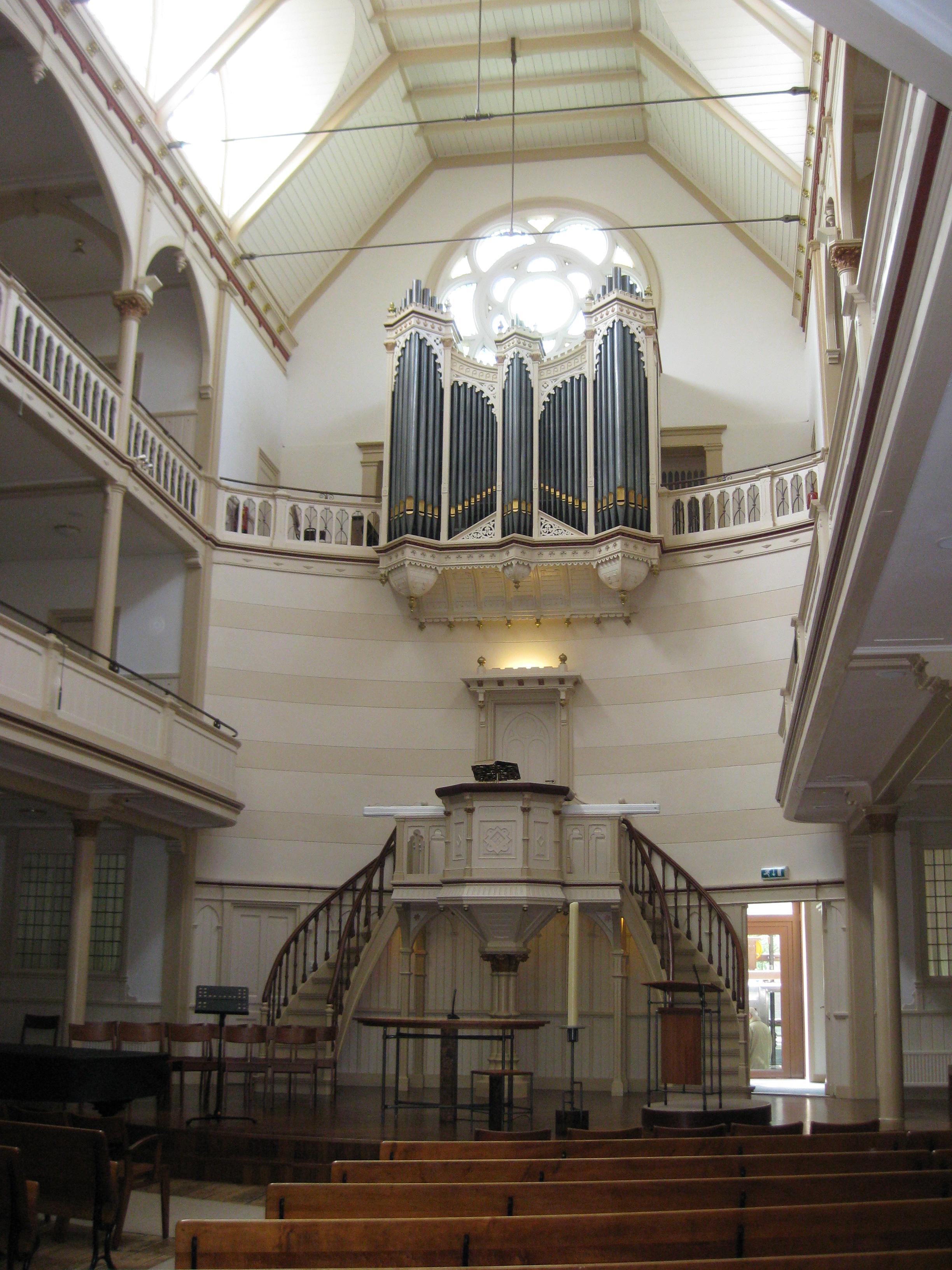 Interieur Keizersgrachtkerk, Keizersgracht 566, Amsterdam